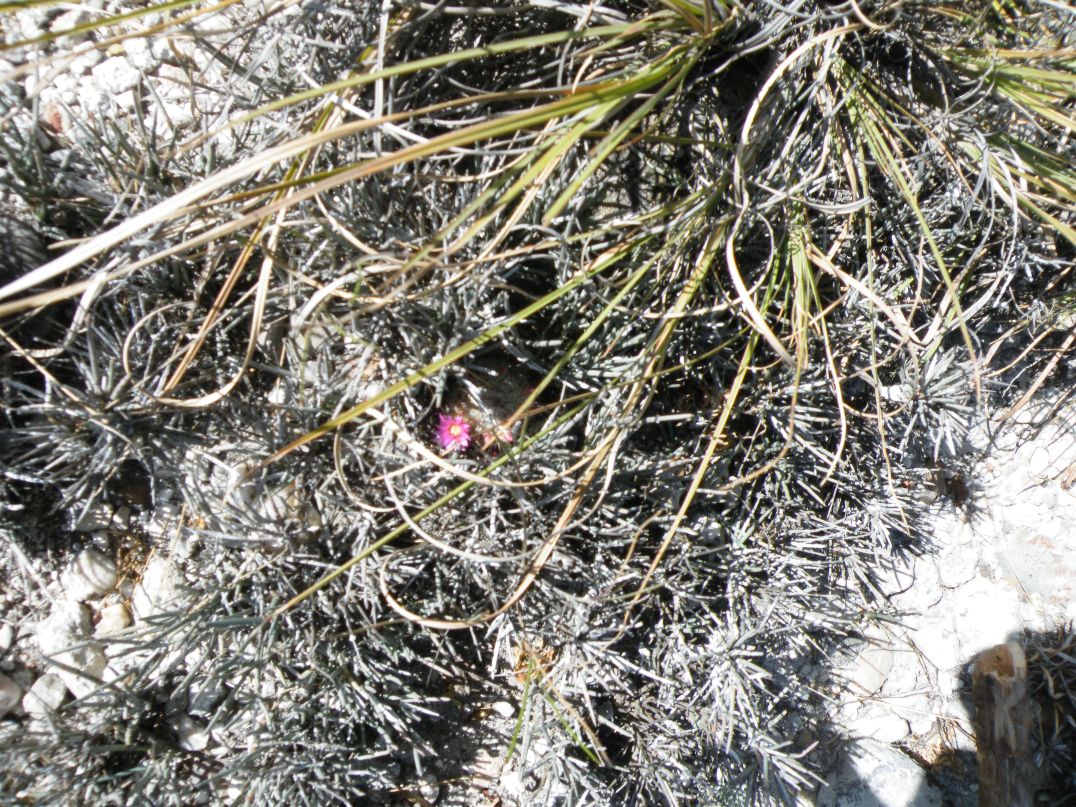 Near Canada Morelos, Puebla